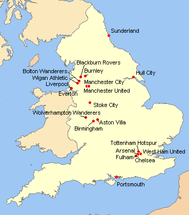 Répartition des clubs en Premier League 2009-2010.